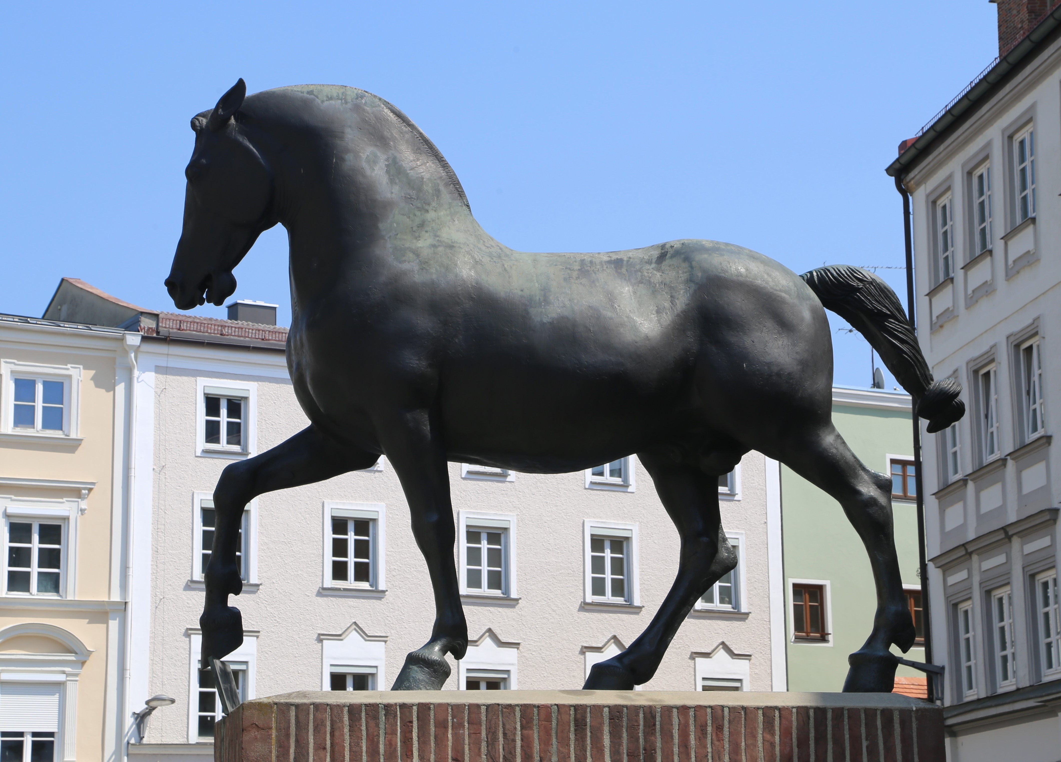 Stadtplatz, Pfarrkirchen; Denkmal für das Rottaler Ross, Pferdestandbild, Bronzeguss auf Klinkersockel, 1965 von Hans Wimmer, 1966 aufgestellt.